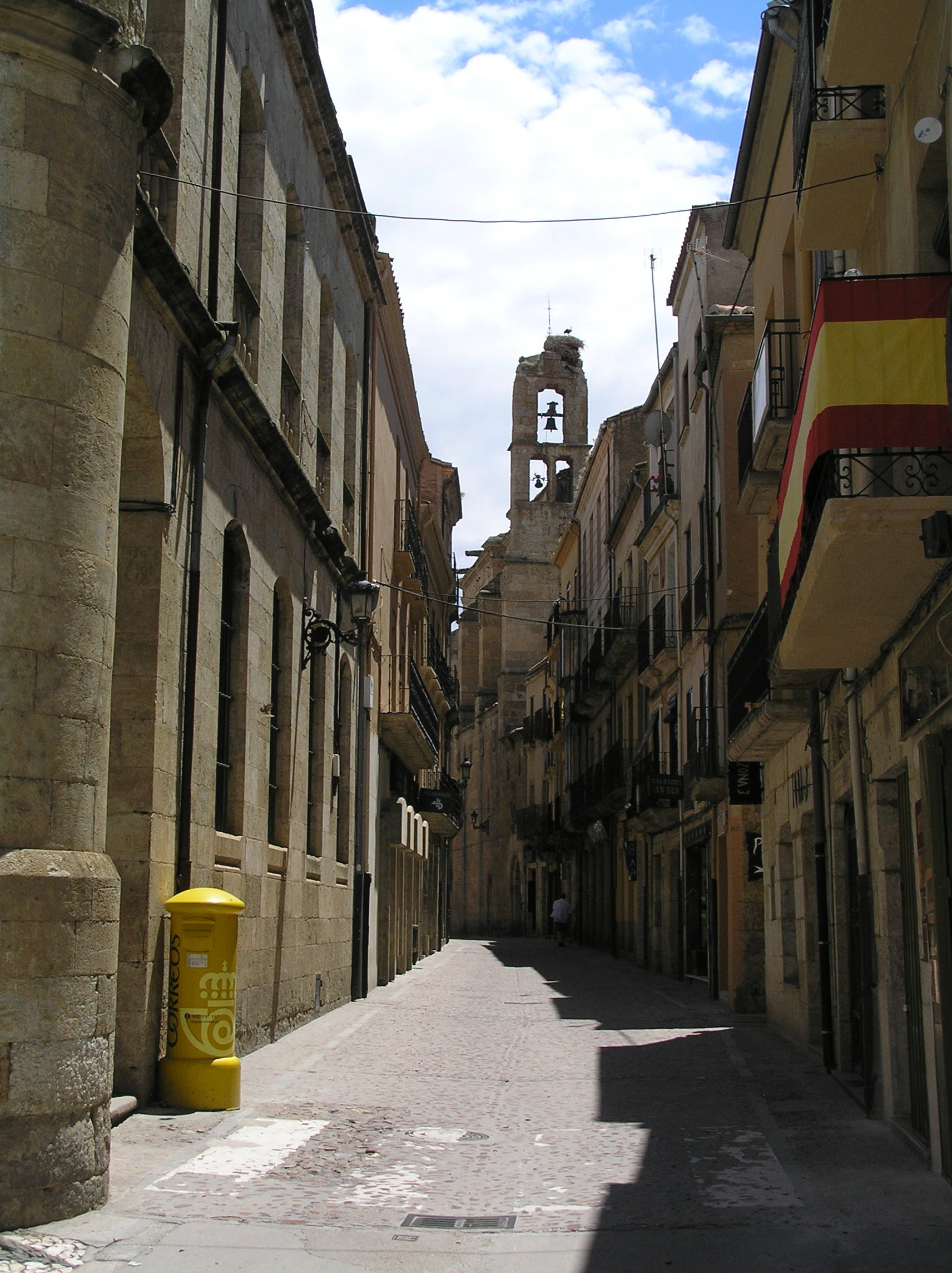 Calle San Juán (vista desde la Plaza Mayor). Ciudad Rodrigo (provincia de Salamanca, Castilla y León, España).